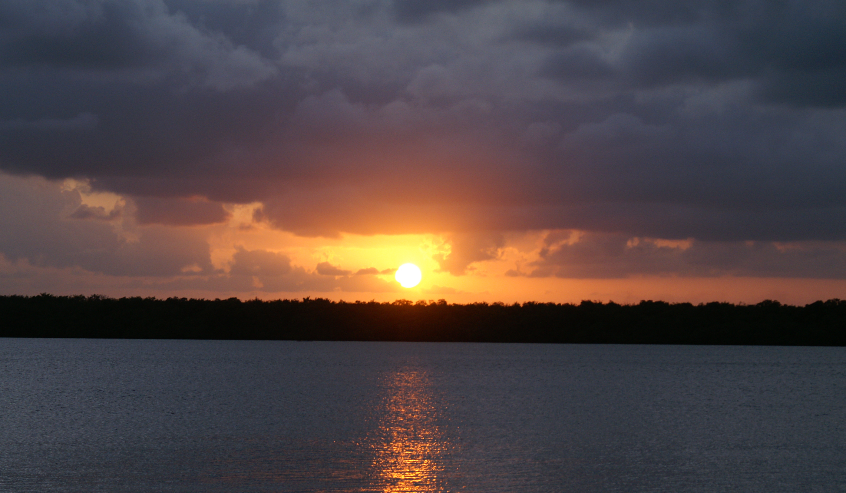 View of the sundown at Praia do Jacaré, Cabedelo, Paraíba, Brazil. Vista do pôr do sol na Praia do Jacaré, Cabedelo, Paraíba, Brasil.